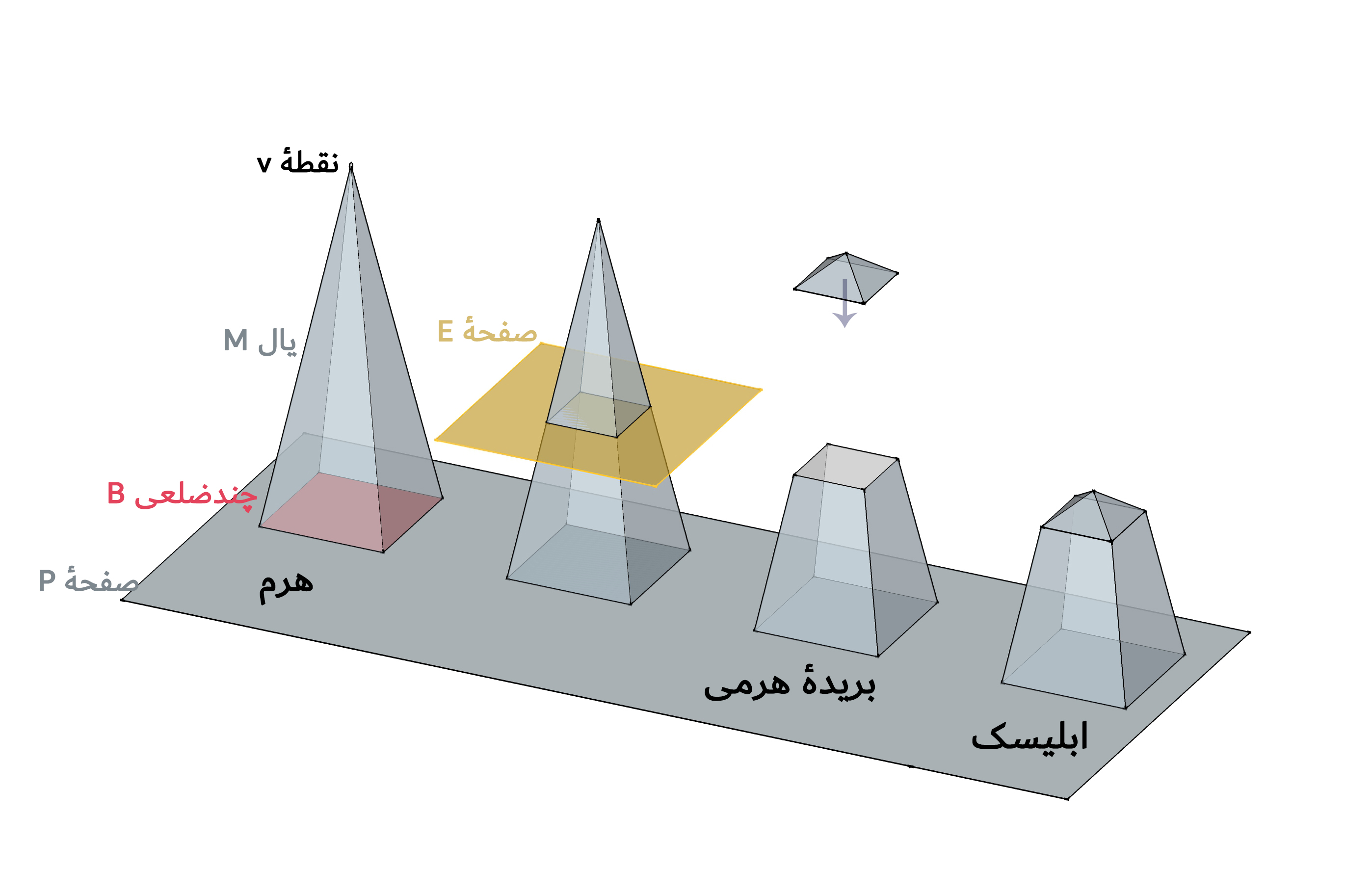 تصویر هرم، بریدهٔ هرمی، و ابلیسک